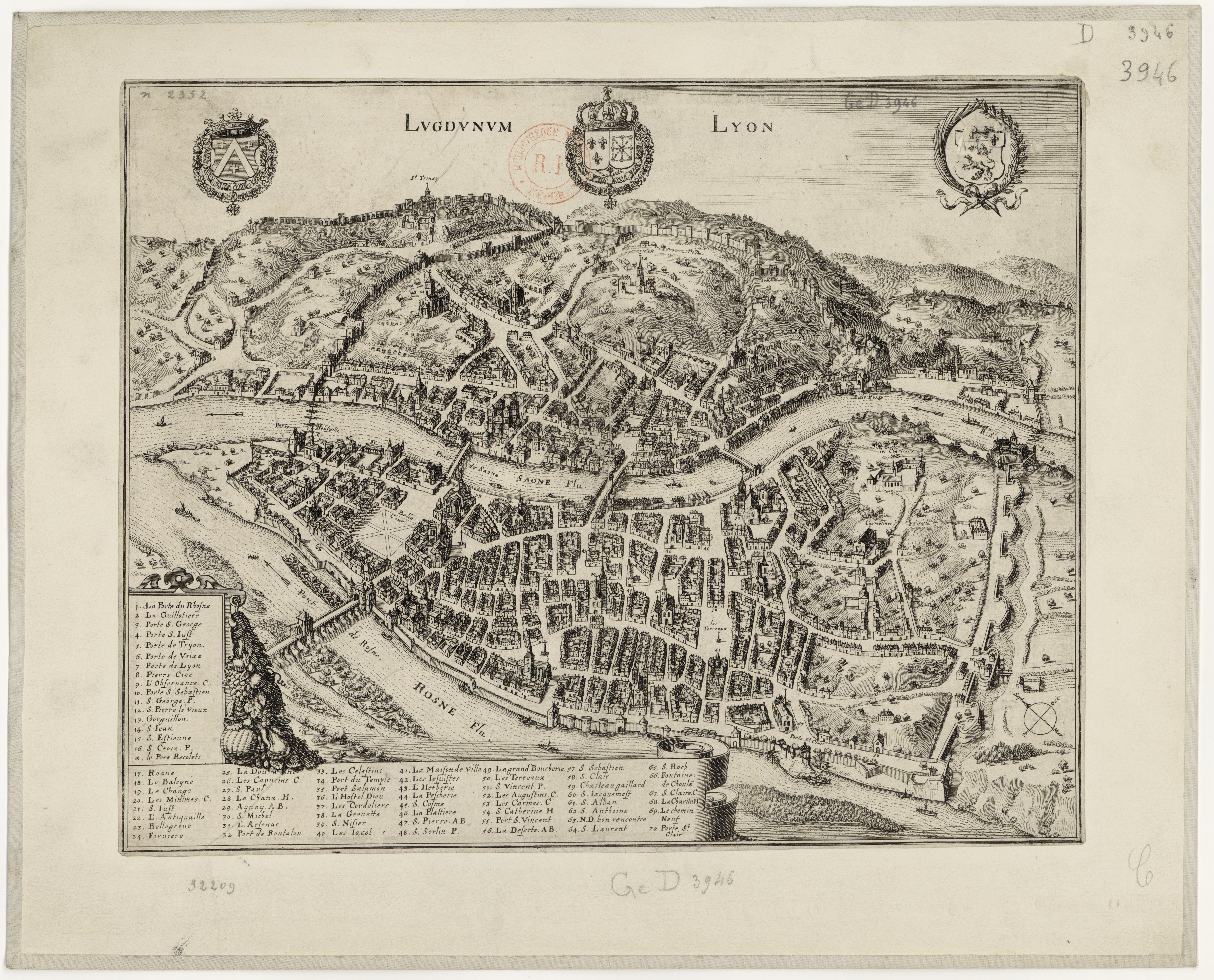 Vue de la ville de Lugdunum ou Lyon à la confluence de la Saone et du Rhone.